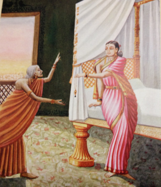 Chitra Ramayana (Illustrated Ramayana) is a simplified story of the great Indian epic in Kannada. The type is bold and beautiful. The thick pages have become brittle and need careful handling. Printed by B. Miller, Superintendent, British India, Press, Mazgaon, Bombay. It was published by, Shrimat Balasaheb Pandit Pant Pratinidhi, chief of Aundh, at Aundh, Satara district. The Kannada version is by Ramachandra Madhwa Mahishi The date shown is 1916. It is all the more important because the book contains illustrations painted by the publisher also called Bhavan Rao Shrinivas Rao, the ruler of the state of Aundh himself.